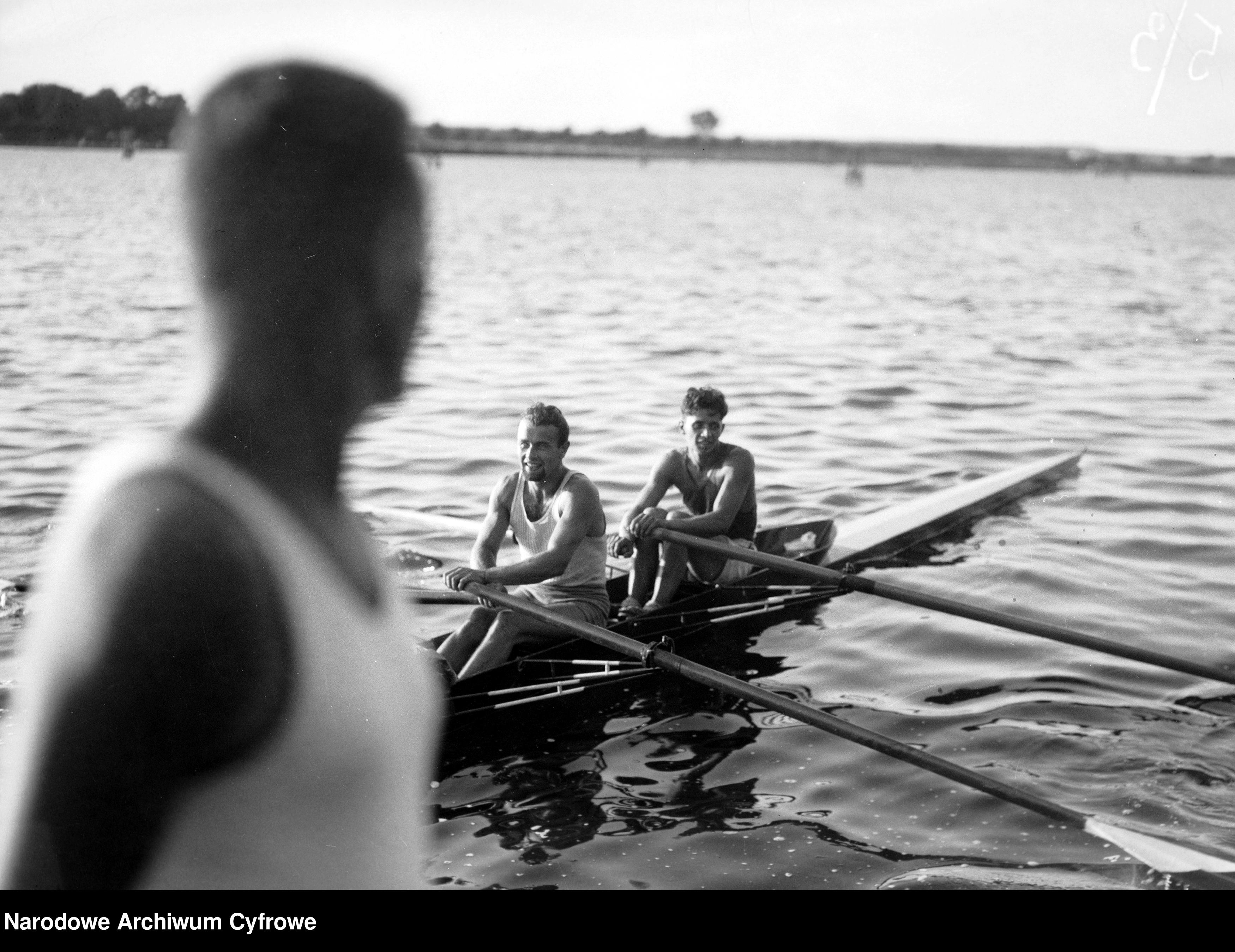 Zwycięzcy wyścigu dwójki podwójnej mężczyzn Bondorowski i Ślesicki z Klubu Wioślarskiego "Wisła" w Warszawie. Mistrzostwa Polski, Bydgoszcz 1933